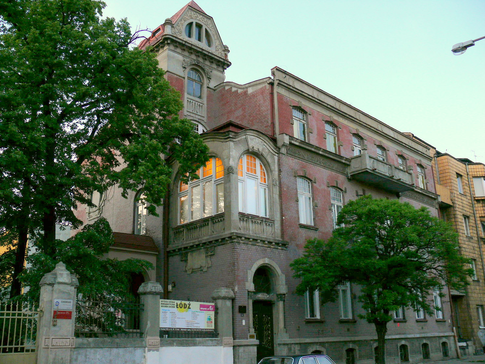 Willa Leona Rappaporta ul. Rewolucji 1905 r. 44, Łódź